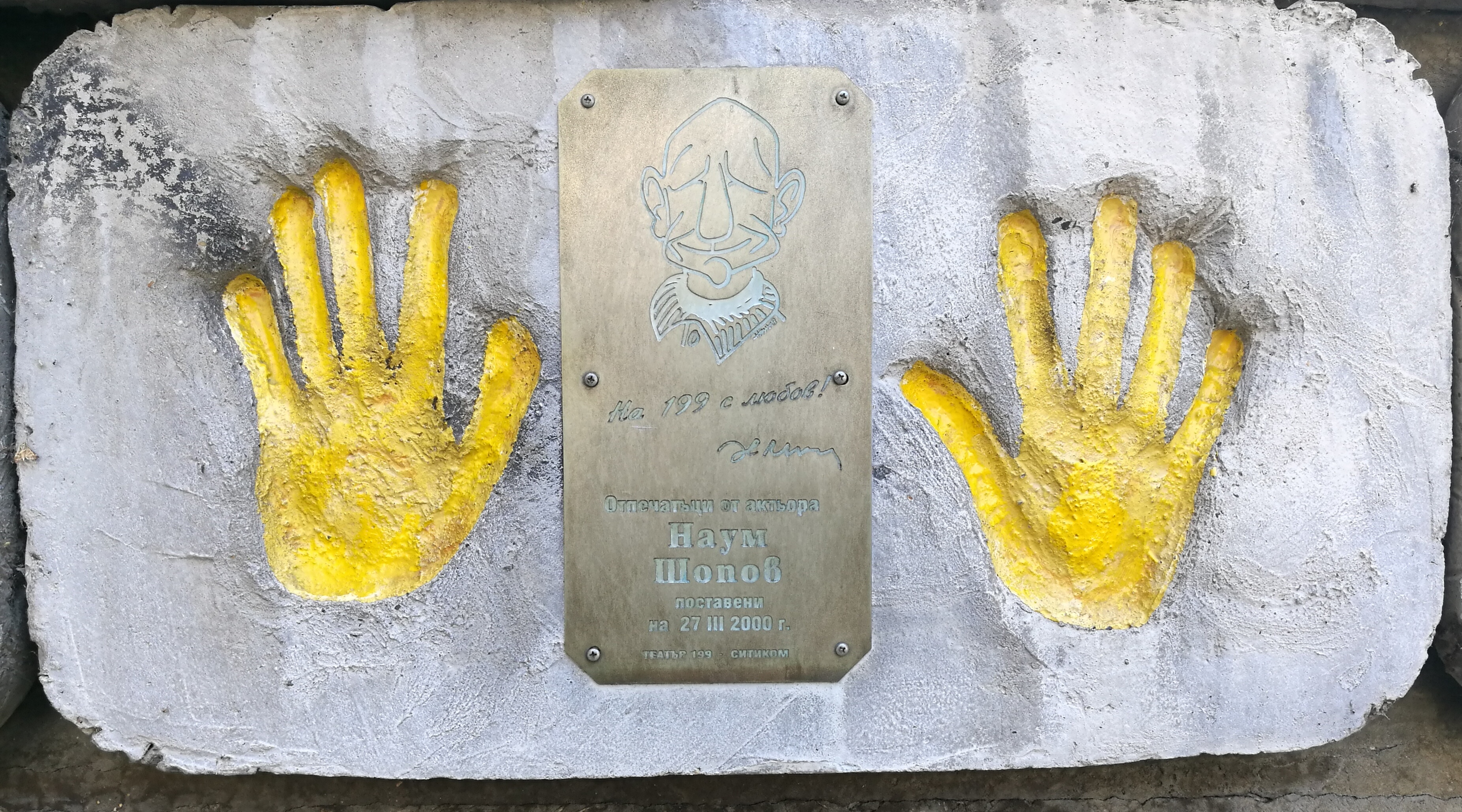 Стената на славата пред Театър 199 - пано с отпечатъци, послание и шарж на Наум Шопов.